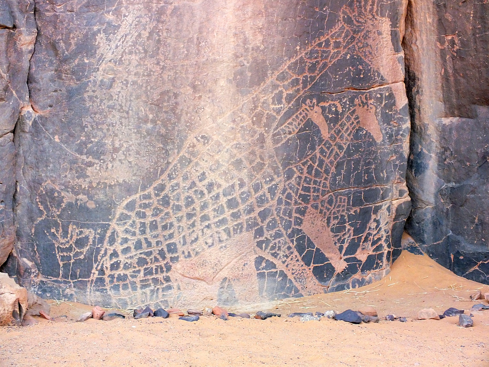 cave painting , algeria